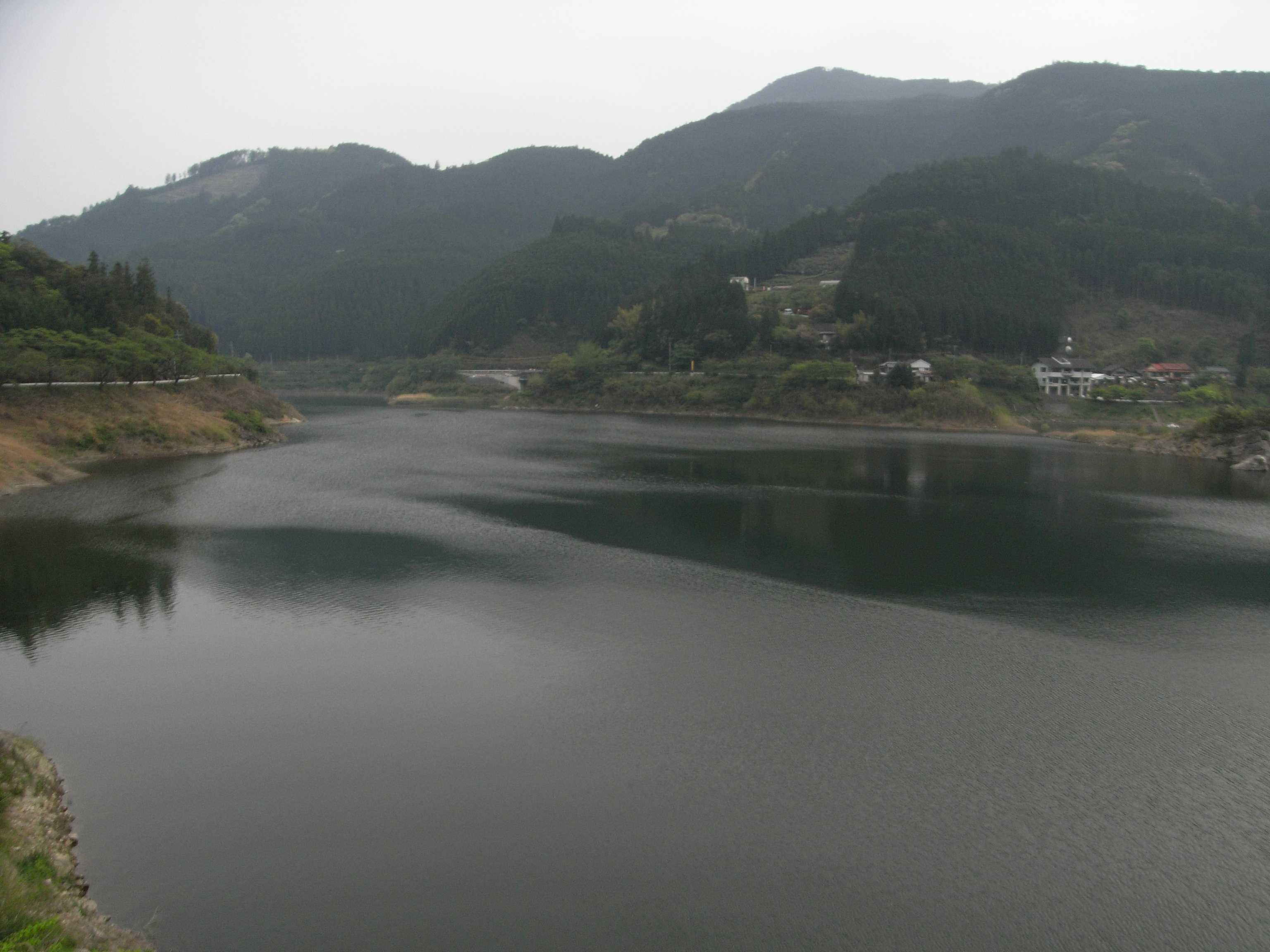 Lake